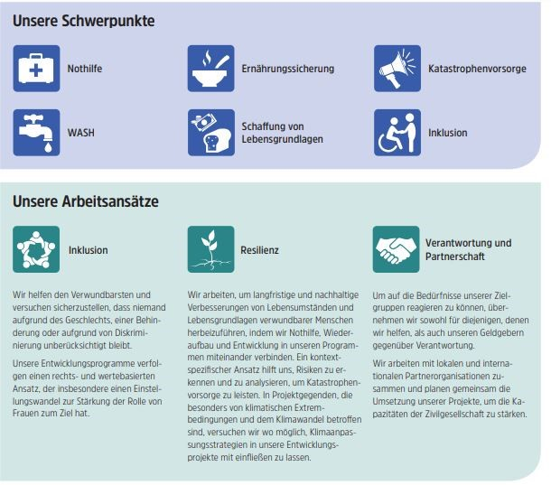 Schwerpunkte, Arbeitsweise Mission East[1]